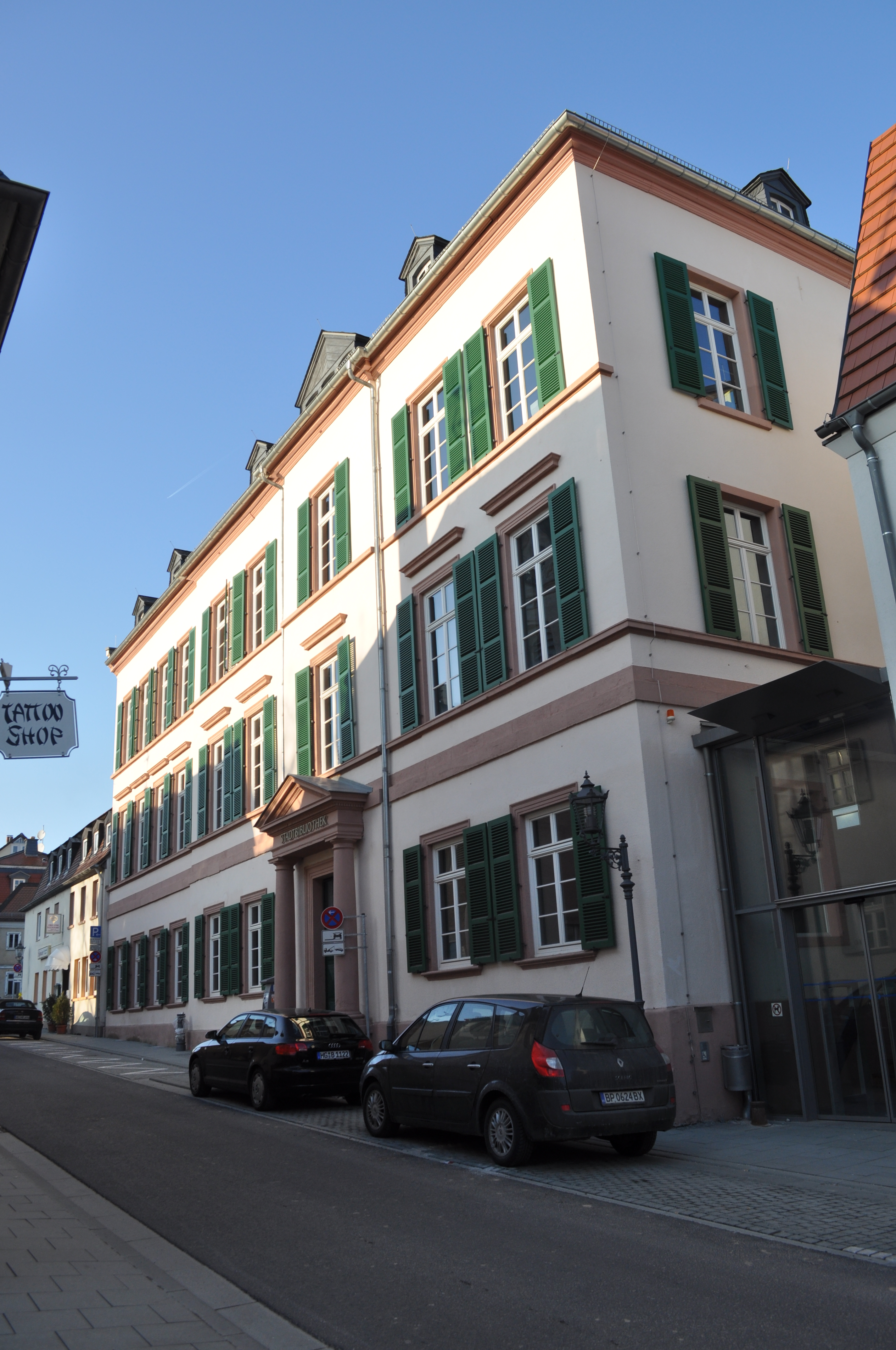 Stadtbibliothek Bad Homburg in der Dorotheenstraße 20/22. Das Gebäude wurde um 1820 als Justitzgebäude erbaut und bis 1965 als Amtsgericht genutzt. Seit 1975 ist es Stadtbibliothek.